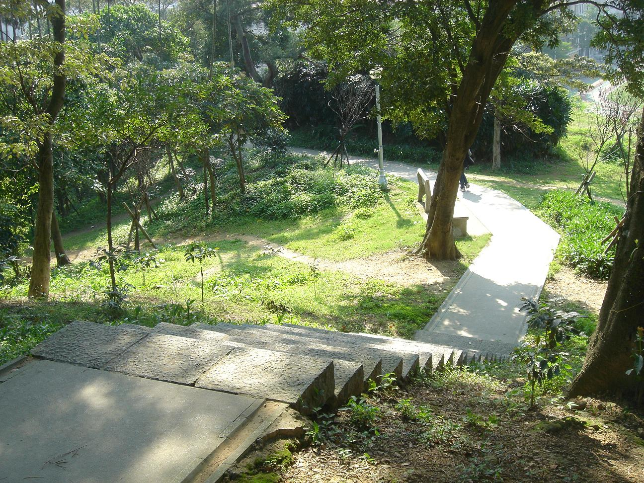 台北縣中和市中坑山東北翼的登山步道。